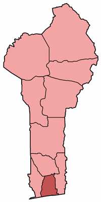 Mappa della diocesi di Cotonou, nel Bénin. Lavoro personale, eseguito a partire da questa immagine di Commons. Fonte per i confini delle diocesi: Guida delle missioni cattoliche 2005, a cura della Congregatio pro gentium evangelizatione, Roma, Urbaniana University Press, 2005. Categoria:Chiesa cattolica in Benin